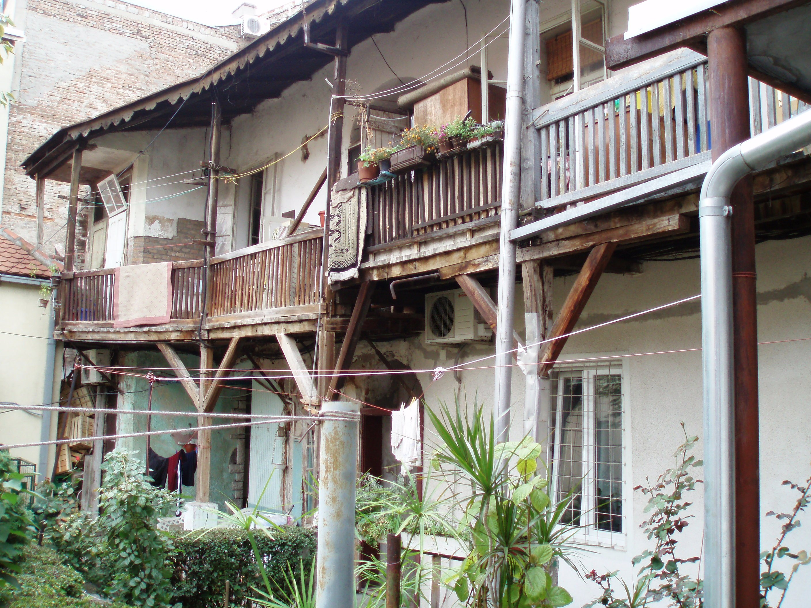 Kuća D Davidovića, dvorišni izgle krila kuće ka Glavnoj ulici, autor fotografije: Nicolo